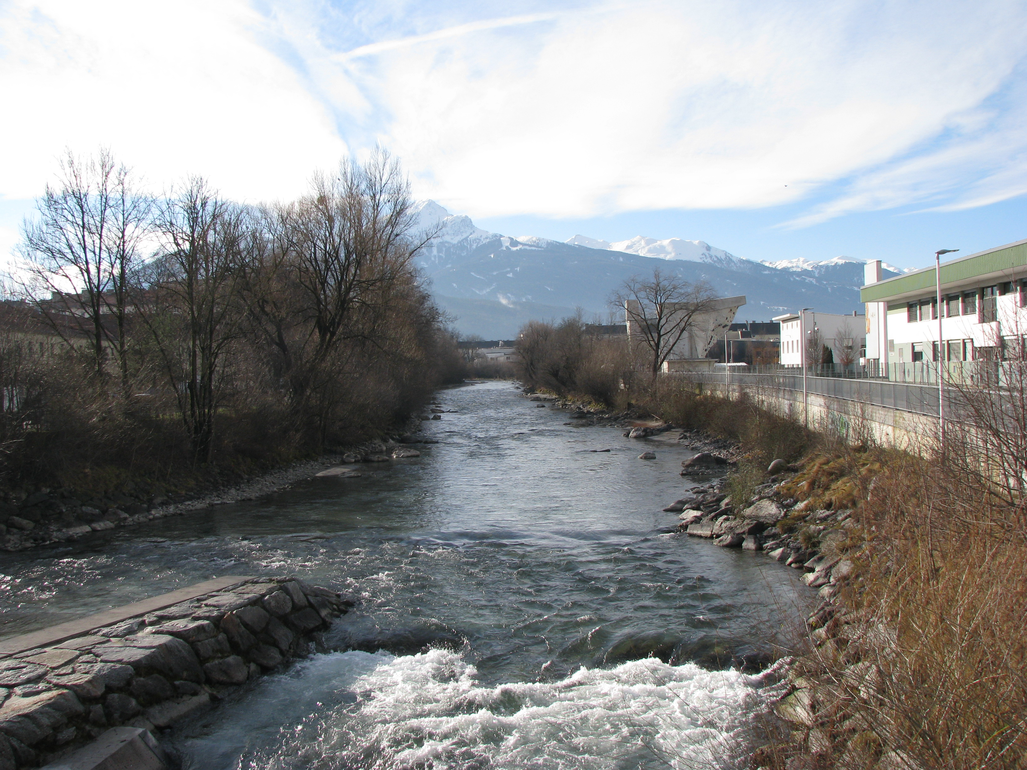 Die Sill in Innsbruck, von der Tiflisbrücke flussaufwärts gesehen